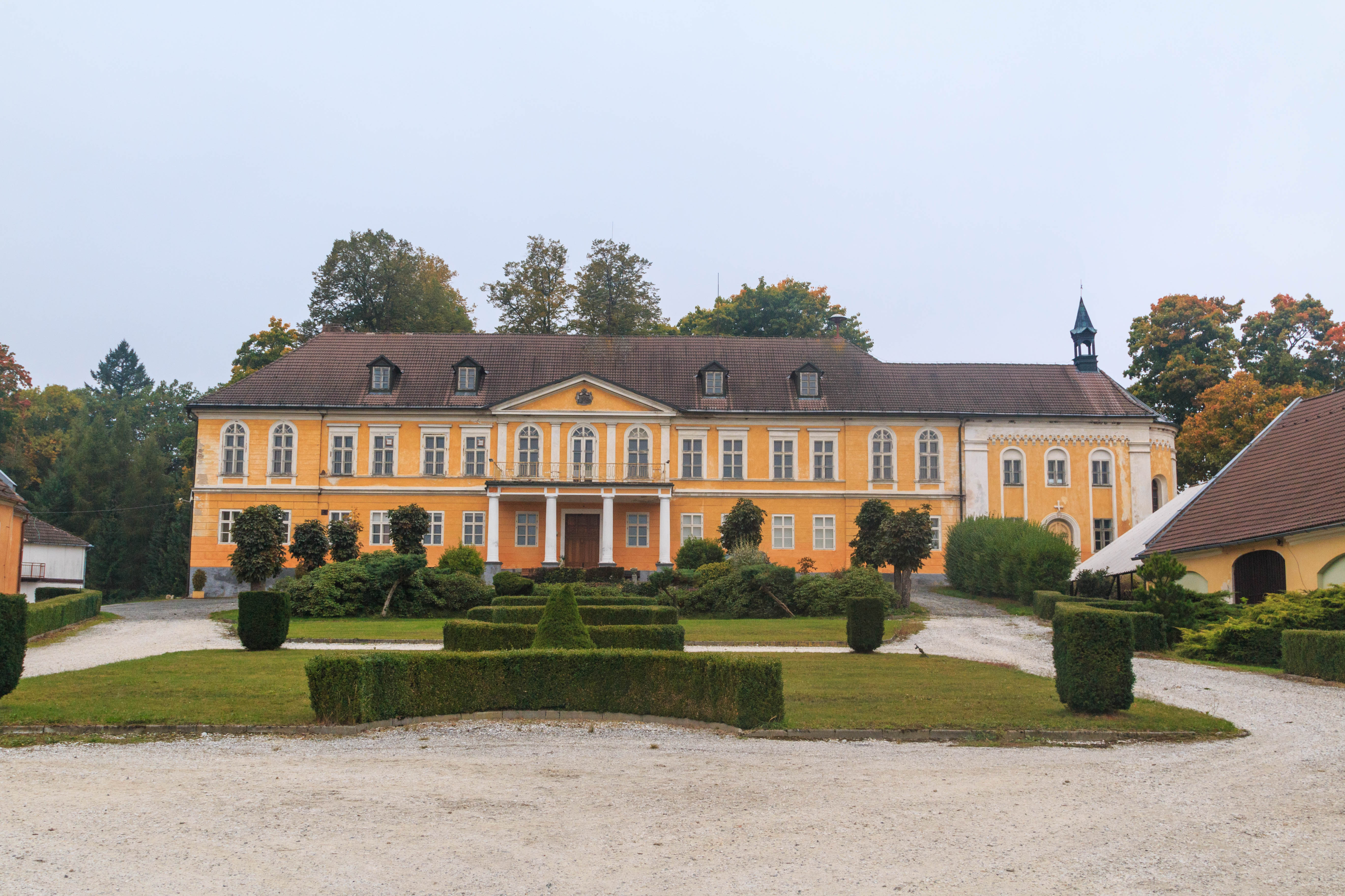 Čekanice - zámek